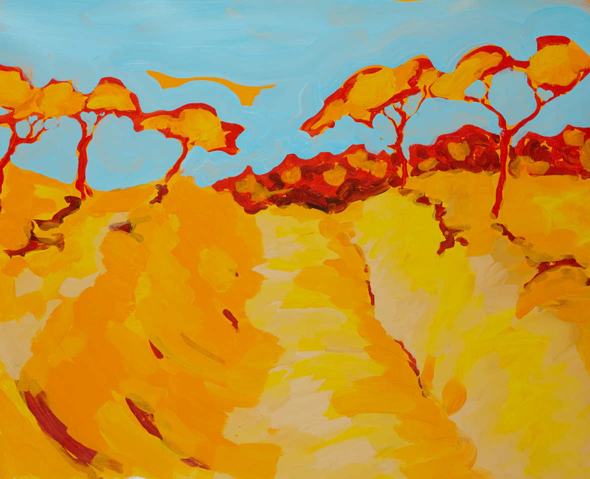 Jürgen Batscheider